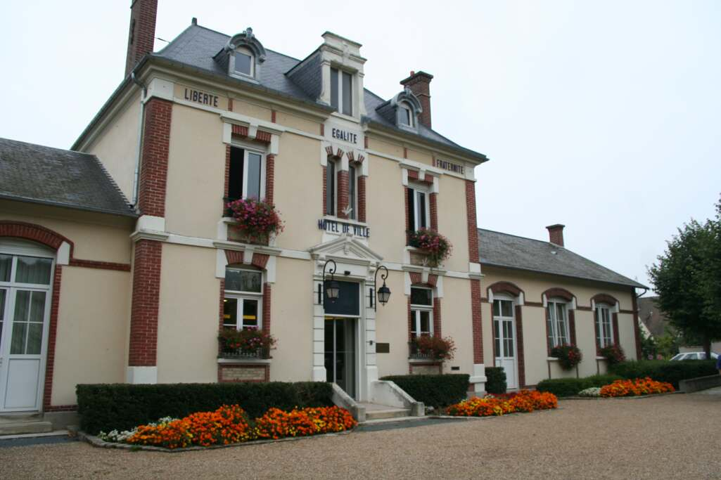 Mairie de Mézières-sur-Seine - Yvelines (France)